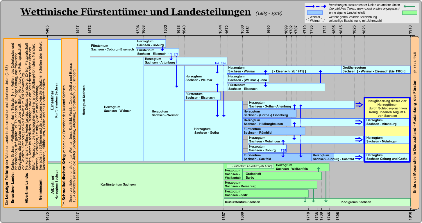 wettinische Fürstentümer und Landesteilungen (1485-1918)